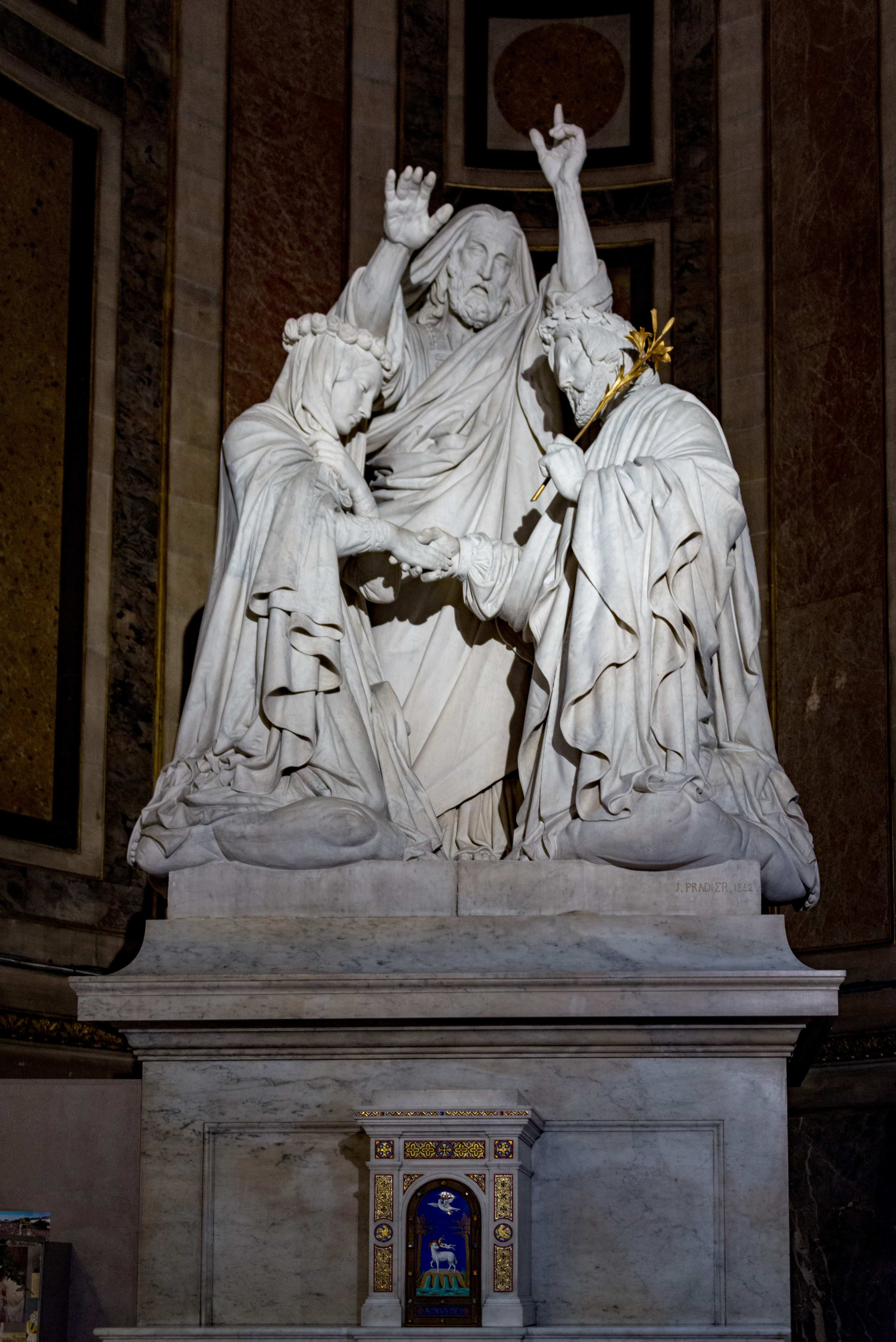 57070-Paris